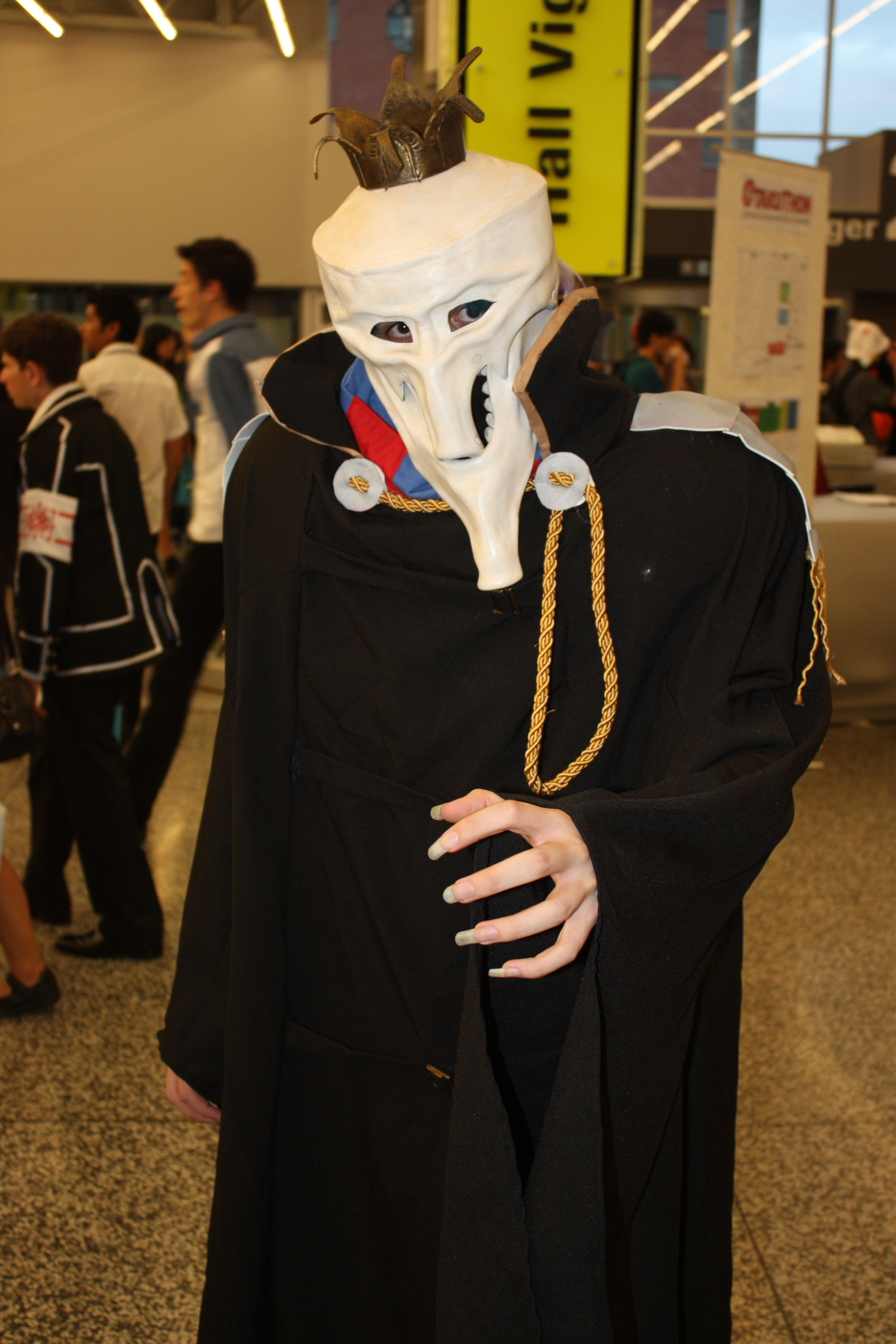 Otakuthon 2014: Deus Ex Machina (Mirai Nikki)